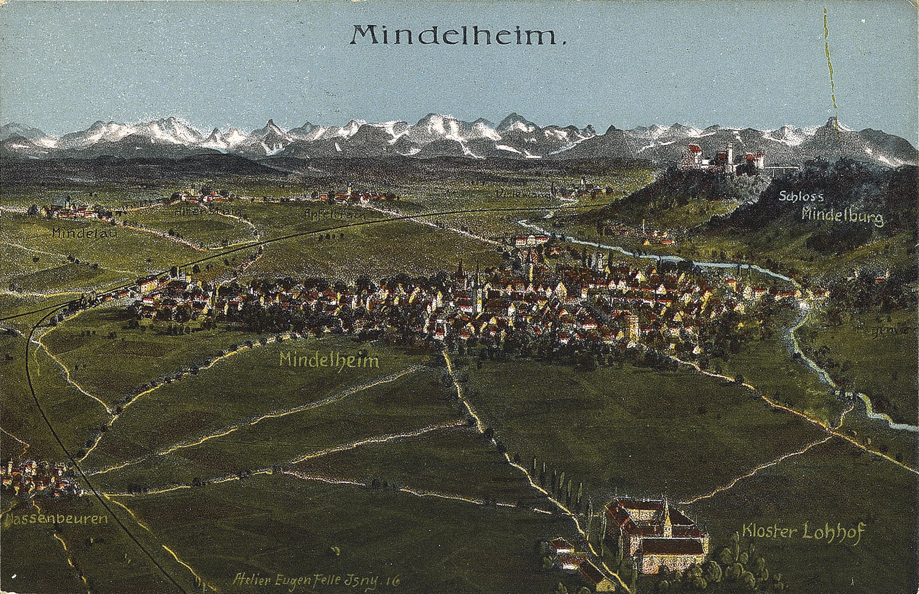 Mindelheim